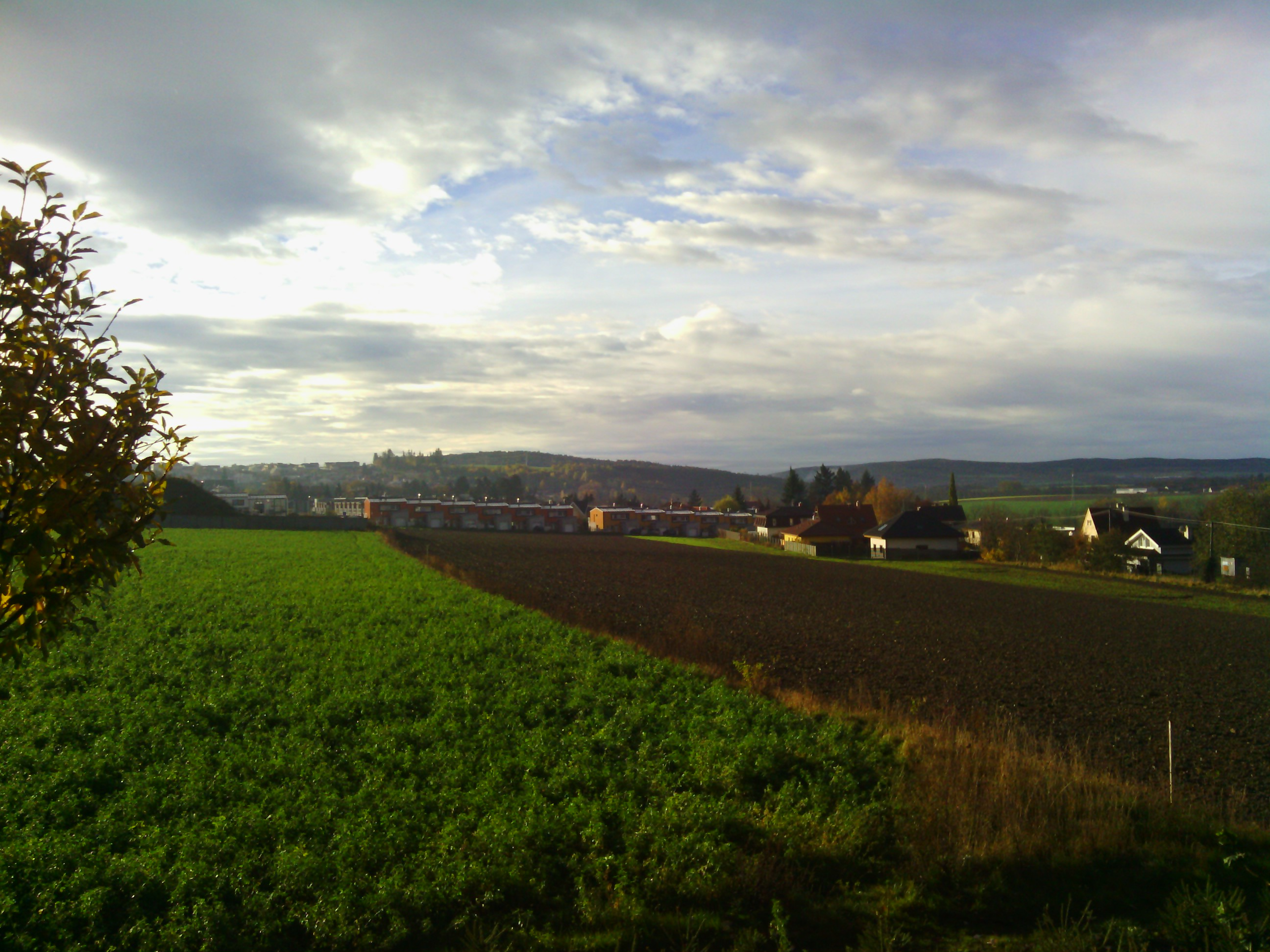 Vrch val (vlevo od středu). Pohled ze severu od hotelu Primavera. V popředí Plzeň-Černice, vpravo od středu v pozadí Jelení vrch.